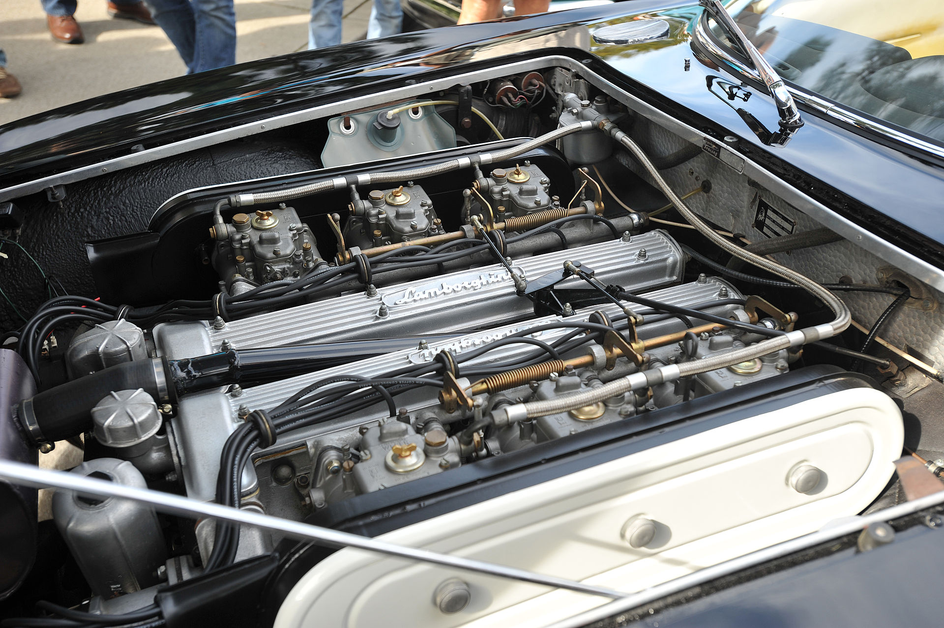 На фото двигатель Lamborghini 350GT объёмом 3,5 литра и мощность 284 лошадиных сил.